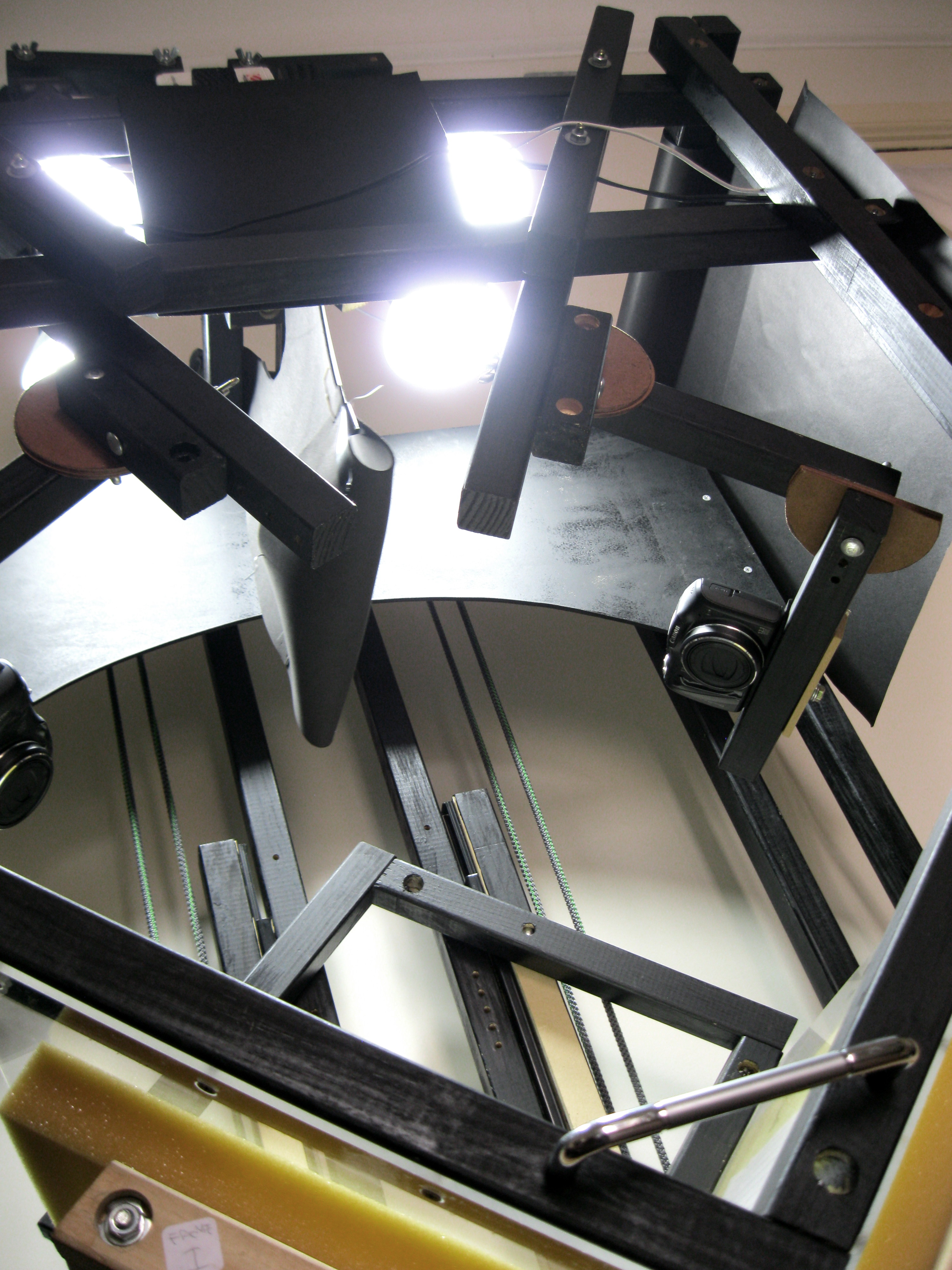 DIYBookScanner CNBA